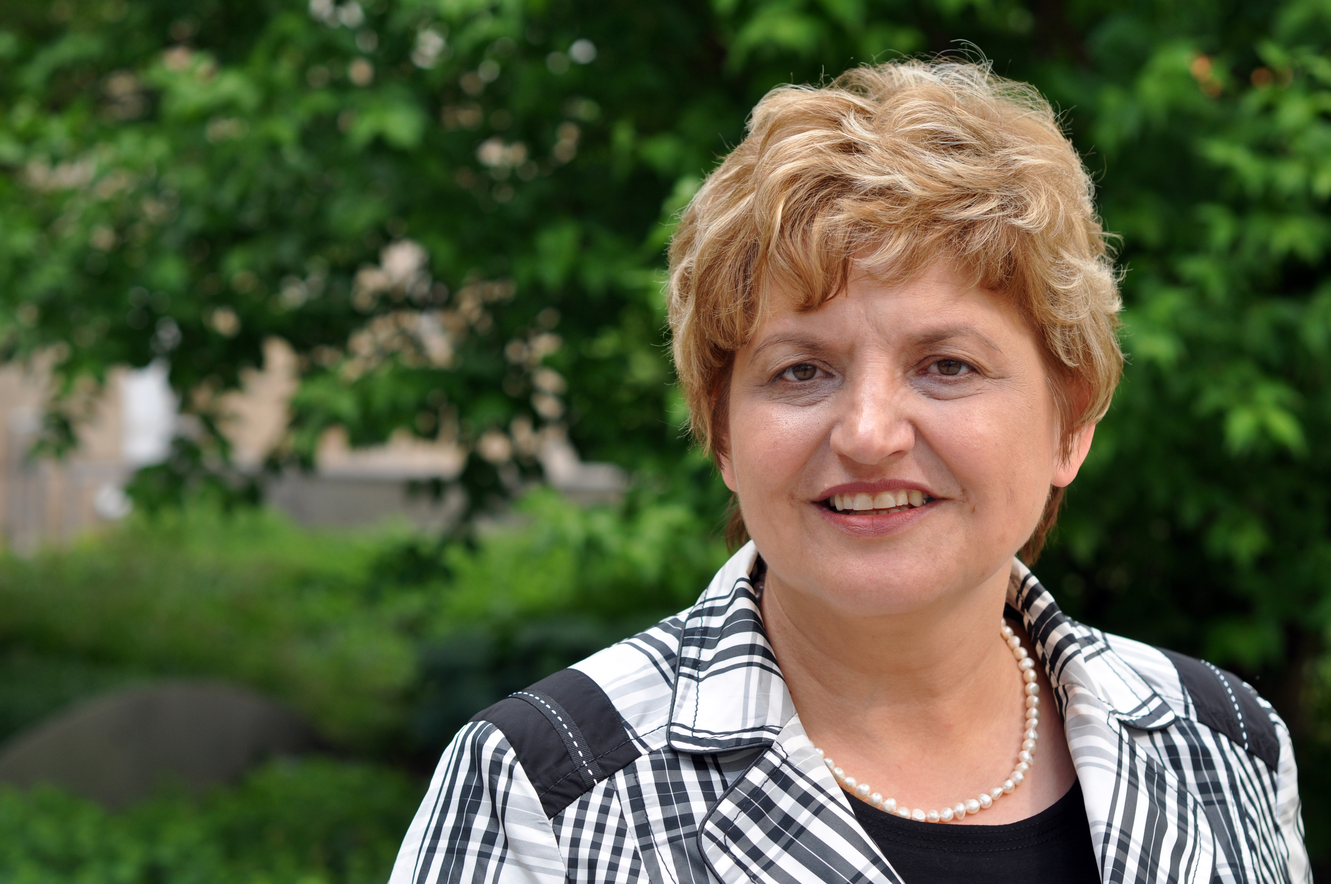 Birgit Diezel Dieses Foto entstand aufgrund einer Zusammenarbeit mit dem Thüringer Landtag. Das Fotoprojekt wurde organisatorisch und finanziell unterstützt vom Verein Skillshare e.V., einem eingetragenen gemeinnützigen Verein mit dem Ziel, Bildung zu fördern durch Unterstützung der Erstellung, Sammlung und Verbreitung freien Wissens. Beim Landtagsprojekt Thüringen vom 18. – 19. Mai 2011 wurden zahlreiche Mitglieder des Thüringer Landtages fotografiert, um Bilder von ihnen für Wikimediaprojekte zur Verfügung zu stellen. Personality rights warningAlthough this work is freely licensed or in the public domain, the person(s) shown may have rights that legally restrict certain re-uses unless those depicted consent to such uses. In these cases, a model release or other evidence of consent could protect you from infringement claims.